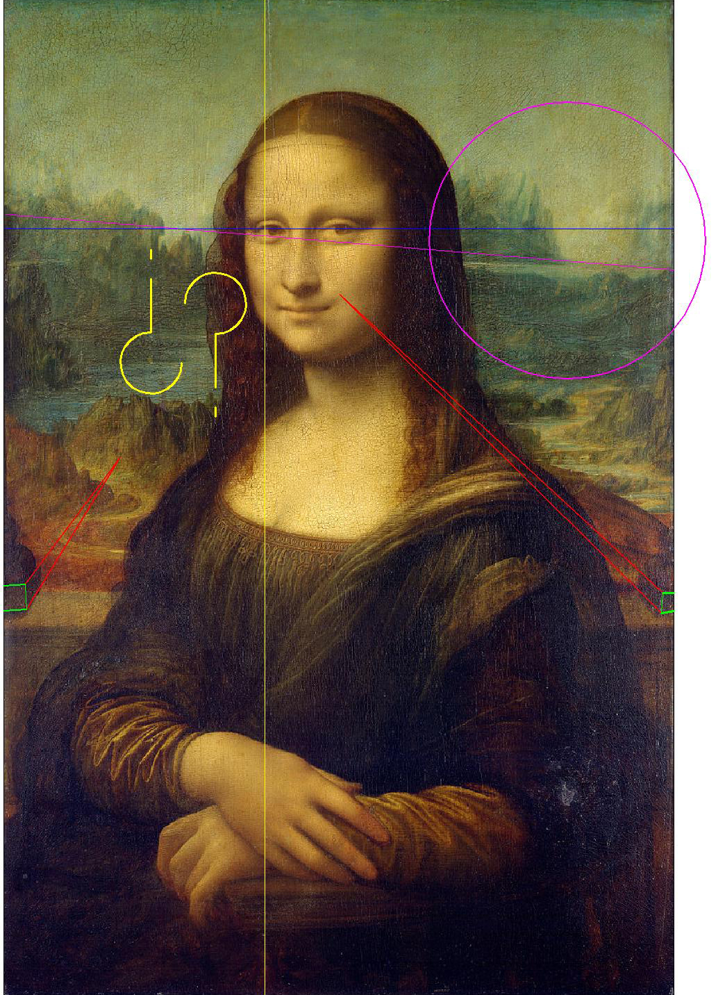 Perspectiva de la Mona Lisa del Louvre